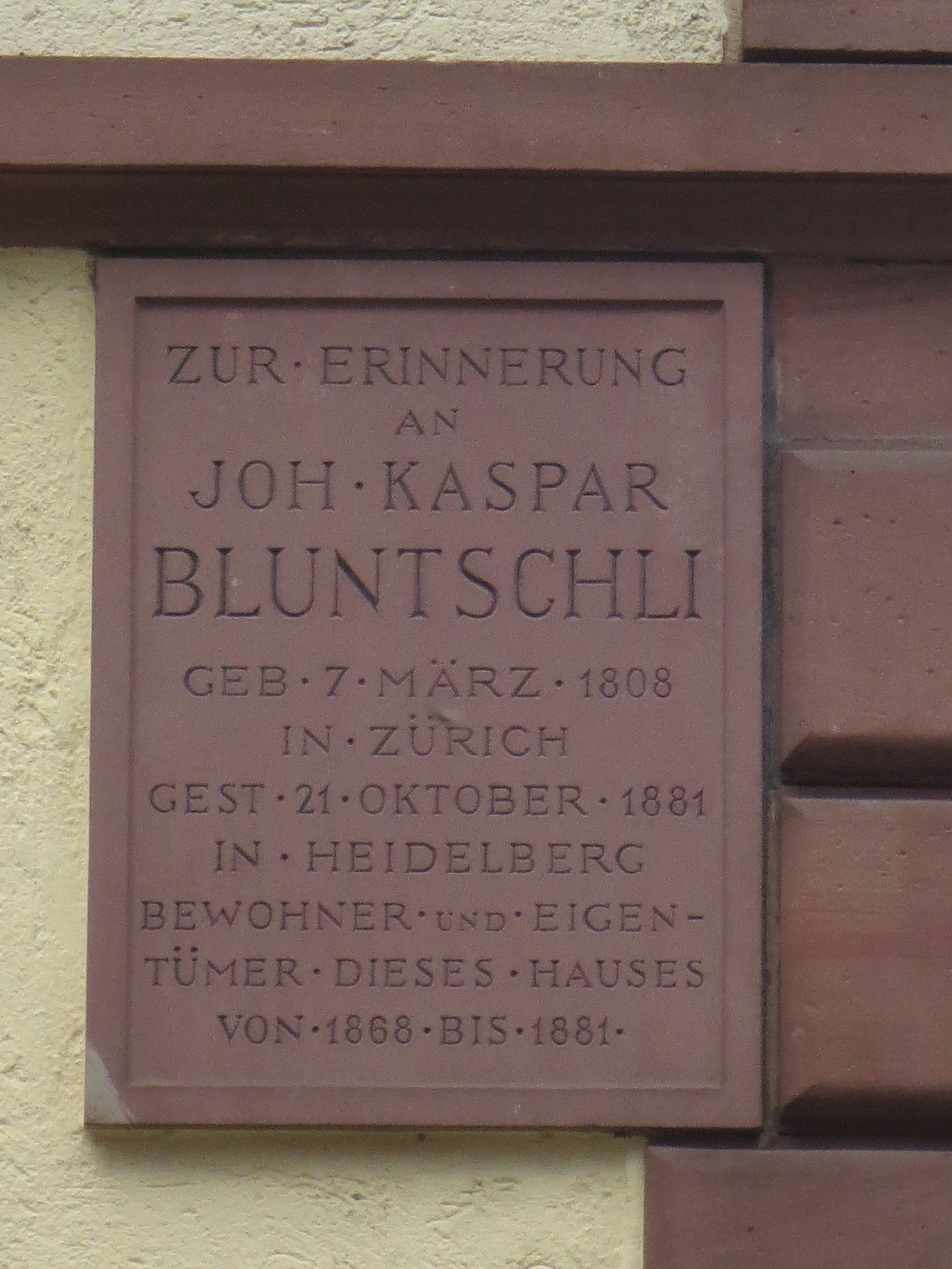 I. Heidelberg Altstadt Campus Universität Heidelberg Johann Kaspar Bluntschli Gedenktafel an seinem Heidelberger Anwesen